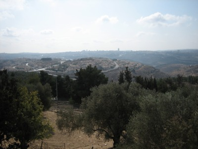 A view from Nabi Samuil towards Jerusalem: area of the Tribe of Benjamin. / Pogled sa sjeverozapada prema Jeruzalemu i Maslinskoj gori: područje plemena Benjamin.